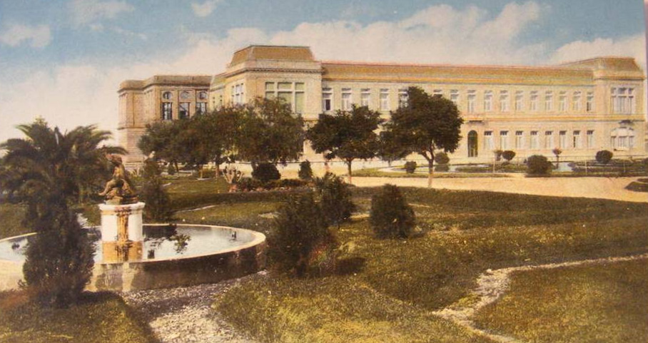 Edificio de la Facultad de Agronomía de la Universidad Nacional de La Plata.